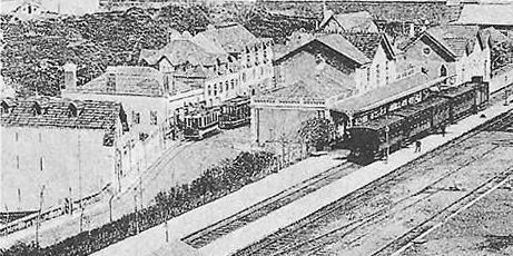 Comboio e elétricos na estação de Sintra: intermodalidade pré-1956.